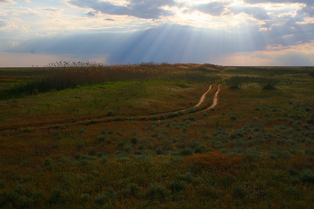 Черные земли: Основной участок заповедника расположен на Прикаспийской низменности, между низовьями рр. Кума и Волга, на территории Яшкульского и Черноземельского районов республики Калмыкия. Почти весь он находится ниже уровня моря. Участок "Озеро Маныч Гудило" находится в центральной части Кума-Манычской впадины, на берегах одноименного озера, в Яшалтинском и Приютненском районах республики Калмыкия, в непосредственной близости от Ростовского заповедника.,Черноземельский район, Калмыкия This image is related to the protected area of Russia number 0800027